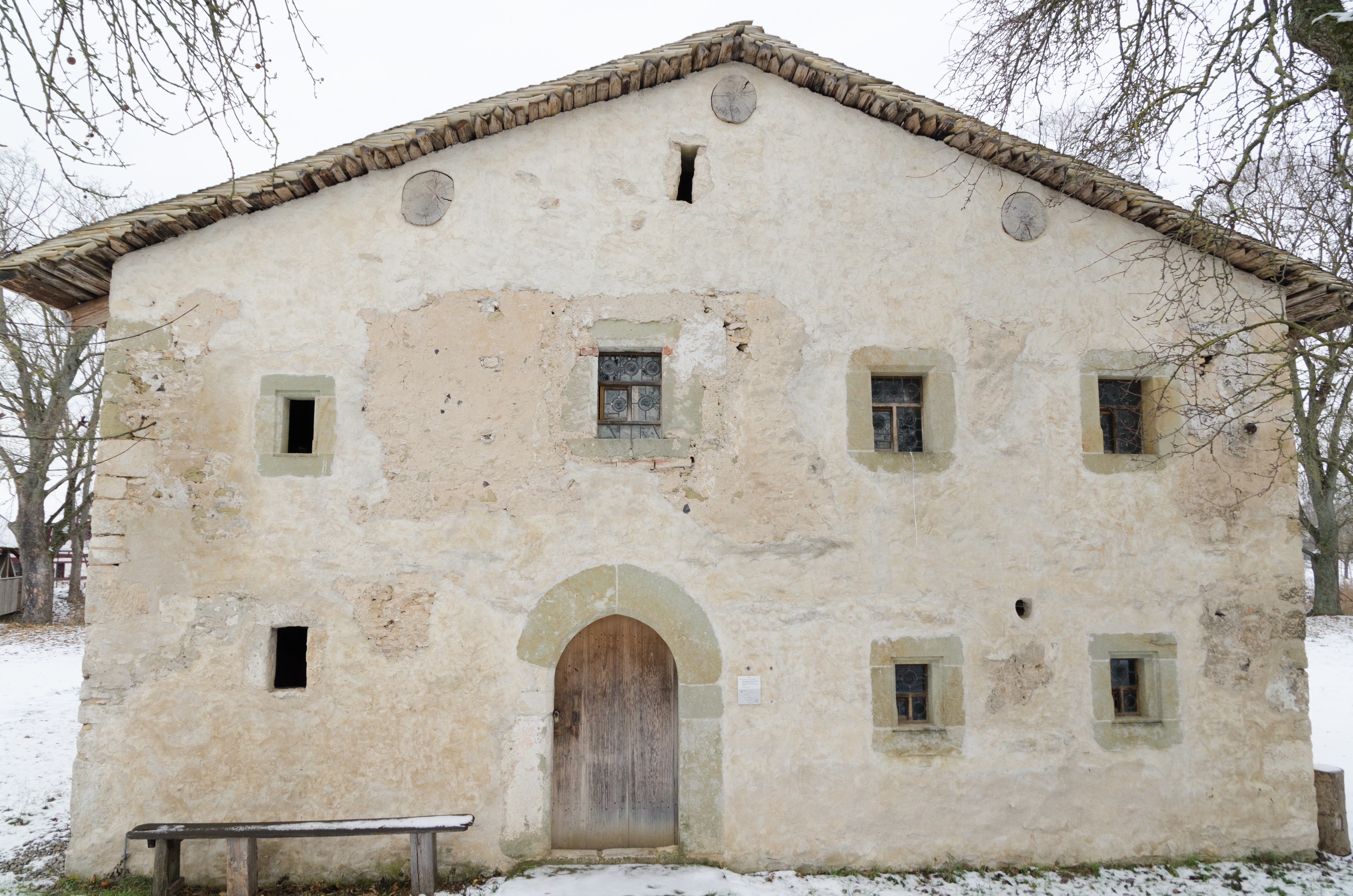 Bad Windsheim, Fränkisches Freilandmuseum, Nr. 101